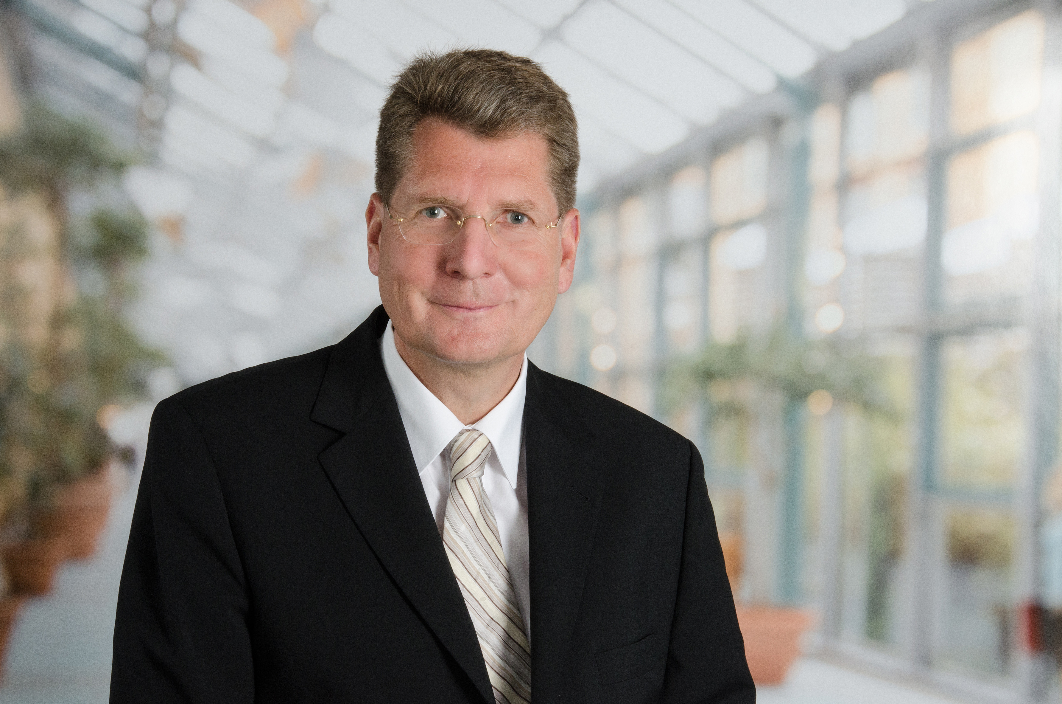 Prof. Dr. med. Dr. h. c. Axel Ekkernkamp im Unfallkrankenhaus Berlin